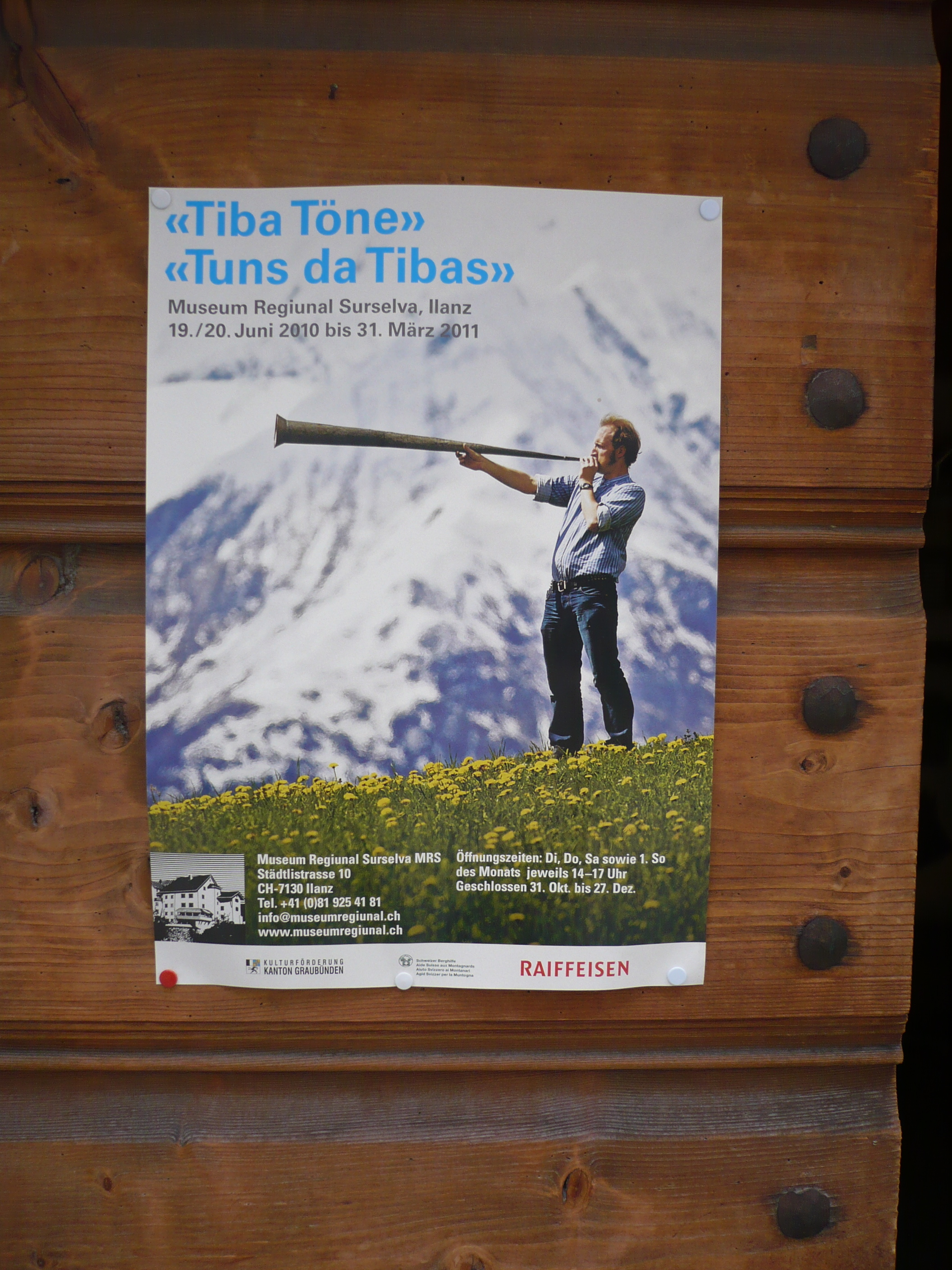 Tiba Ausstellung im Museum Regional Surselva in Ilanz